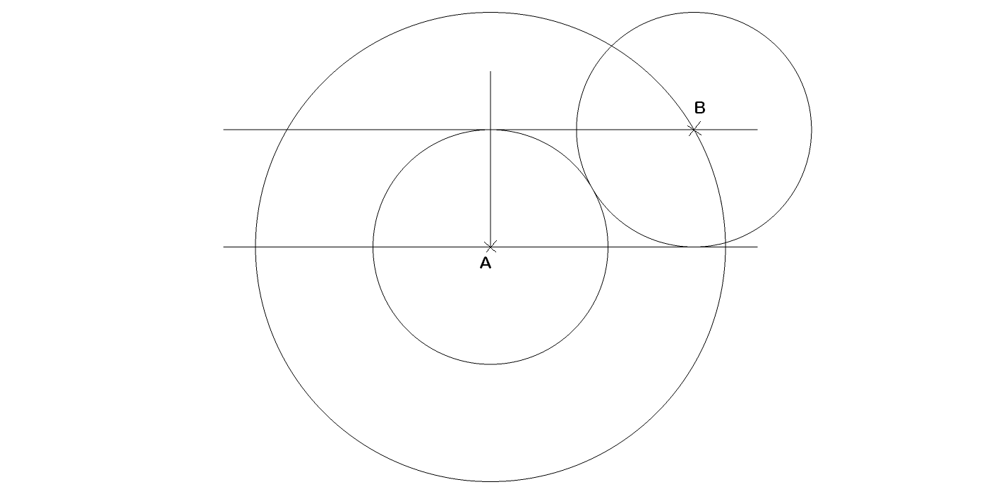 etape2